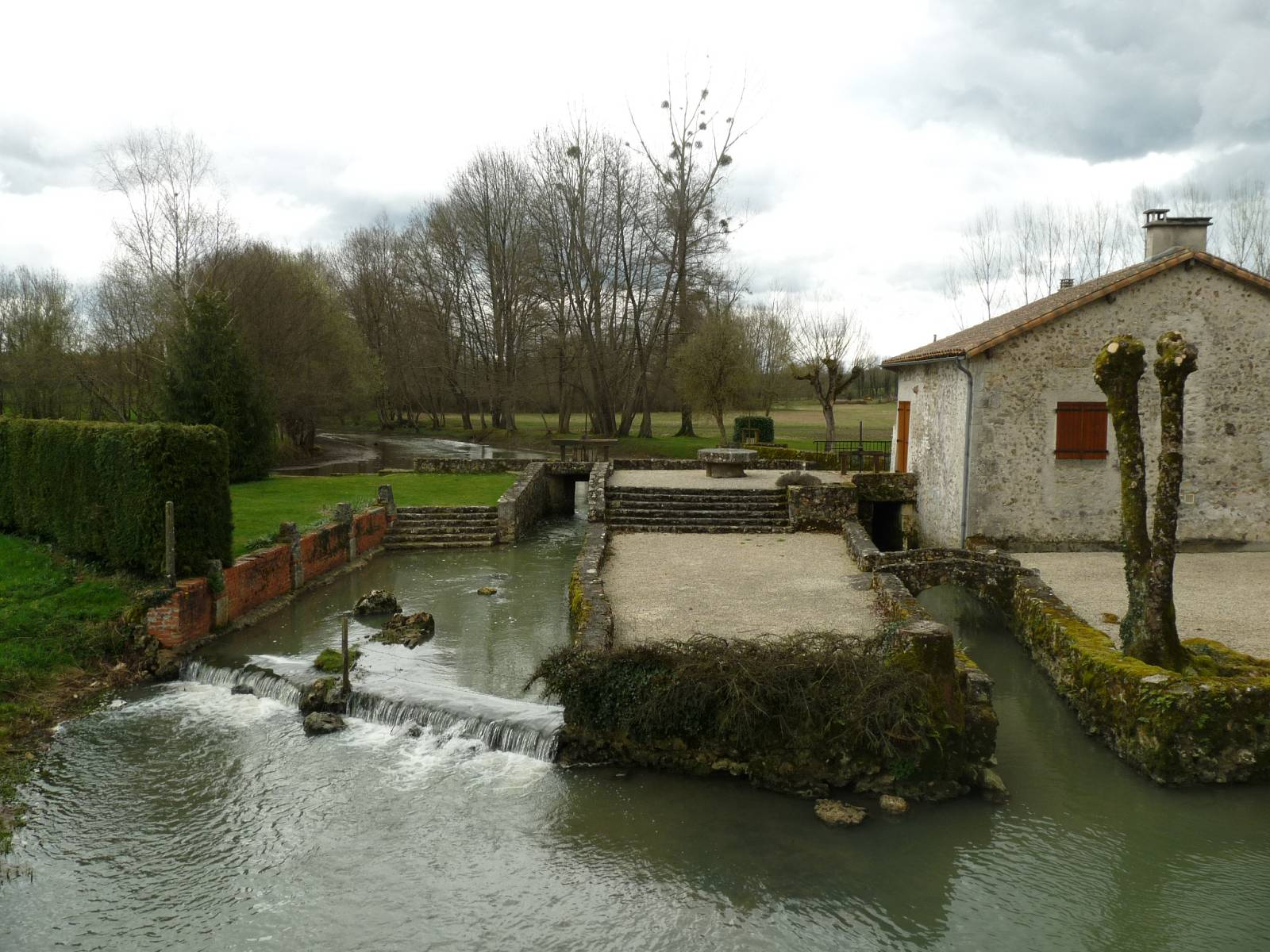 Le Son à Nieuil, Charente, France